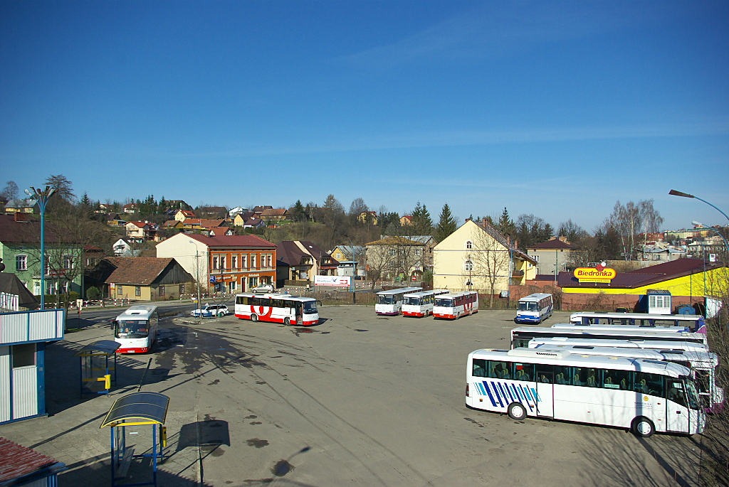 Parking dworca autobusowego Sanok Lipińskiego